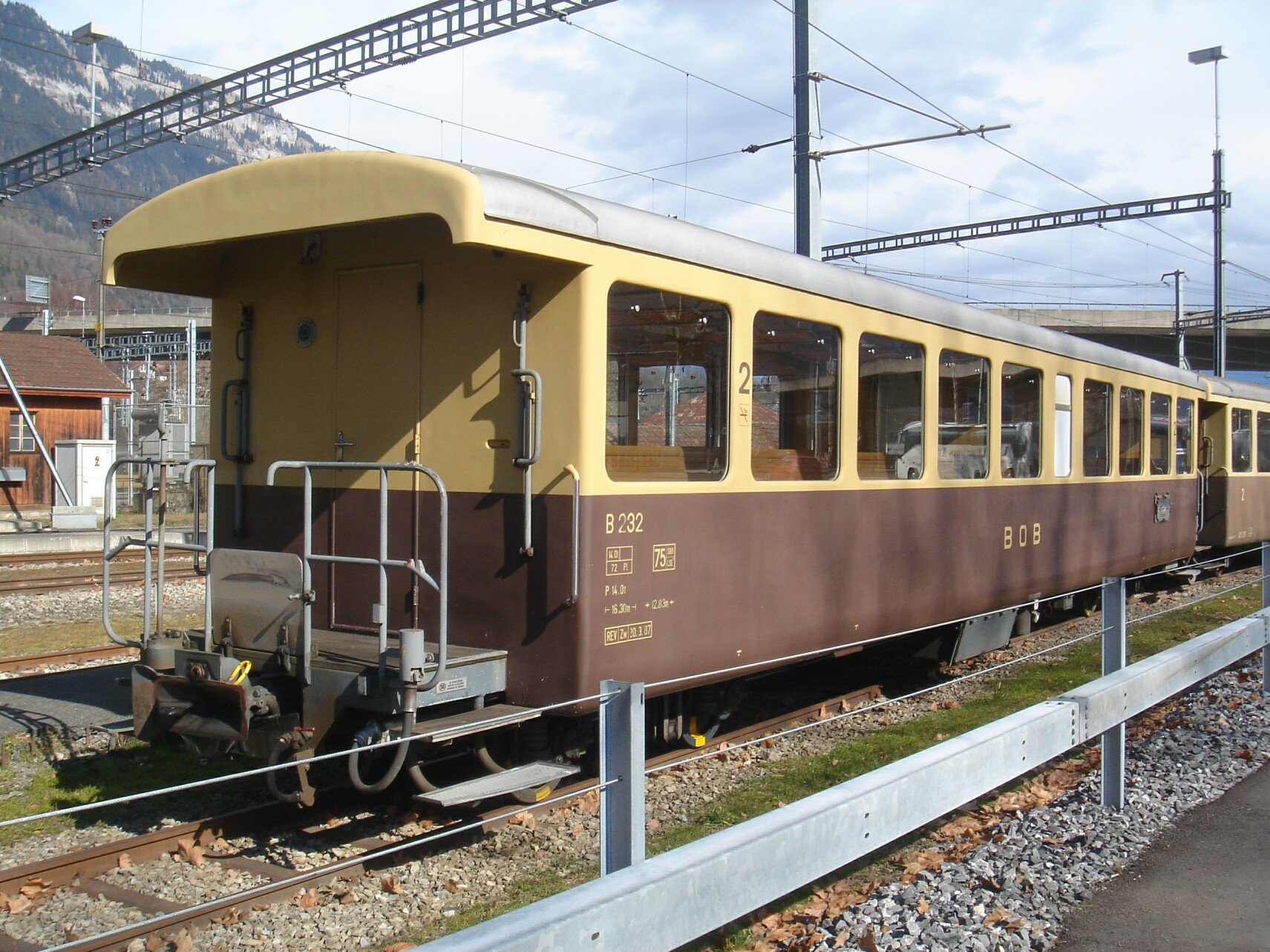 BOB Leichtstahlwagen mit offenen Plattformen Bi 232 abgestellt in Interlaken Ost